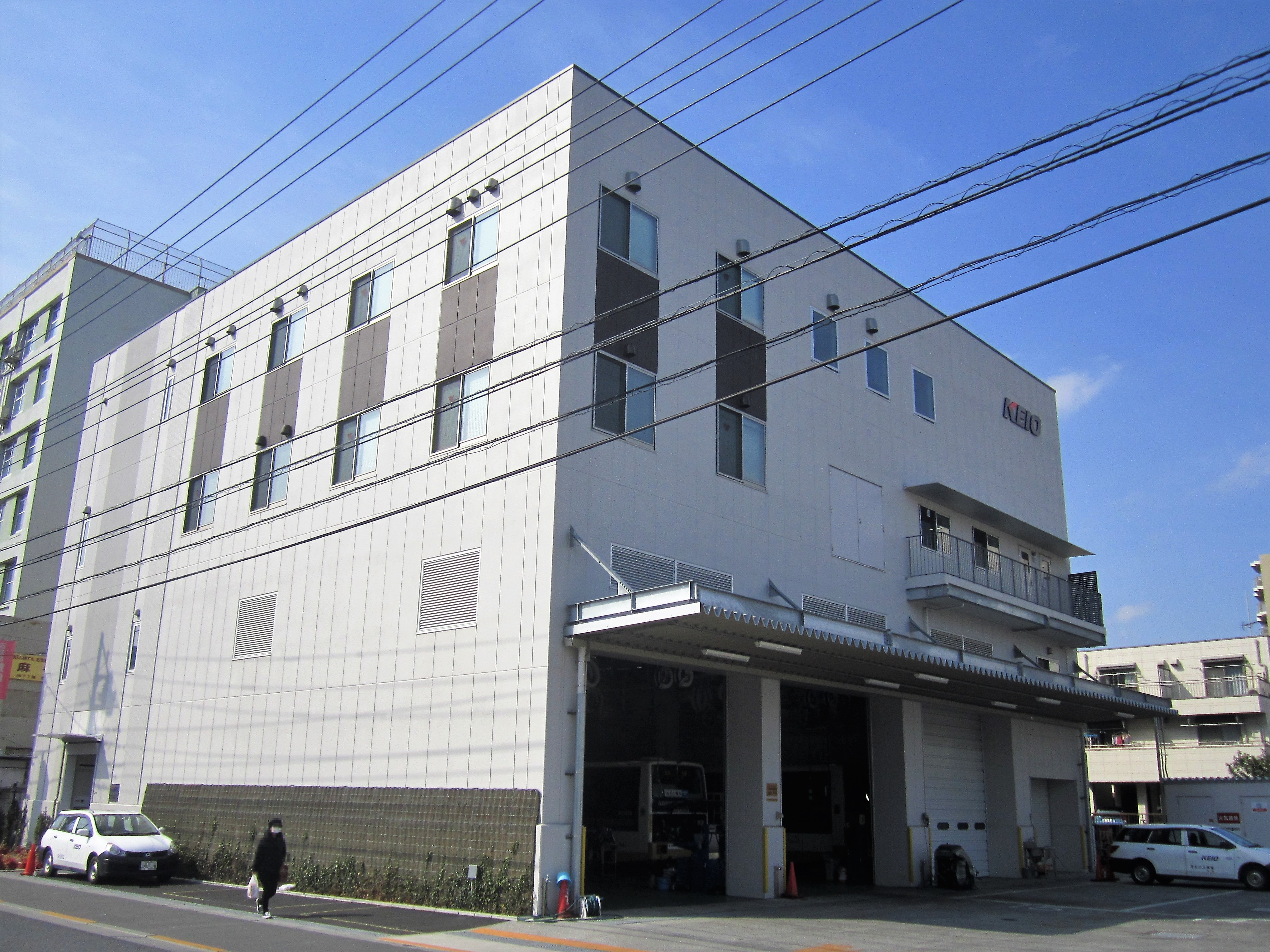 京王バス東・中野営業所